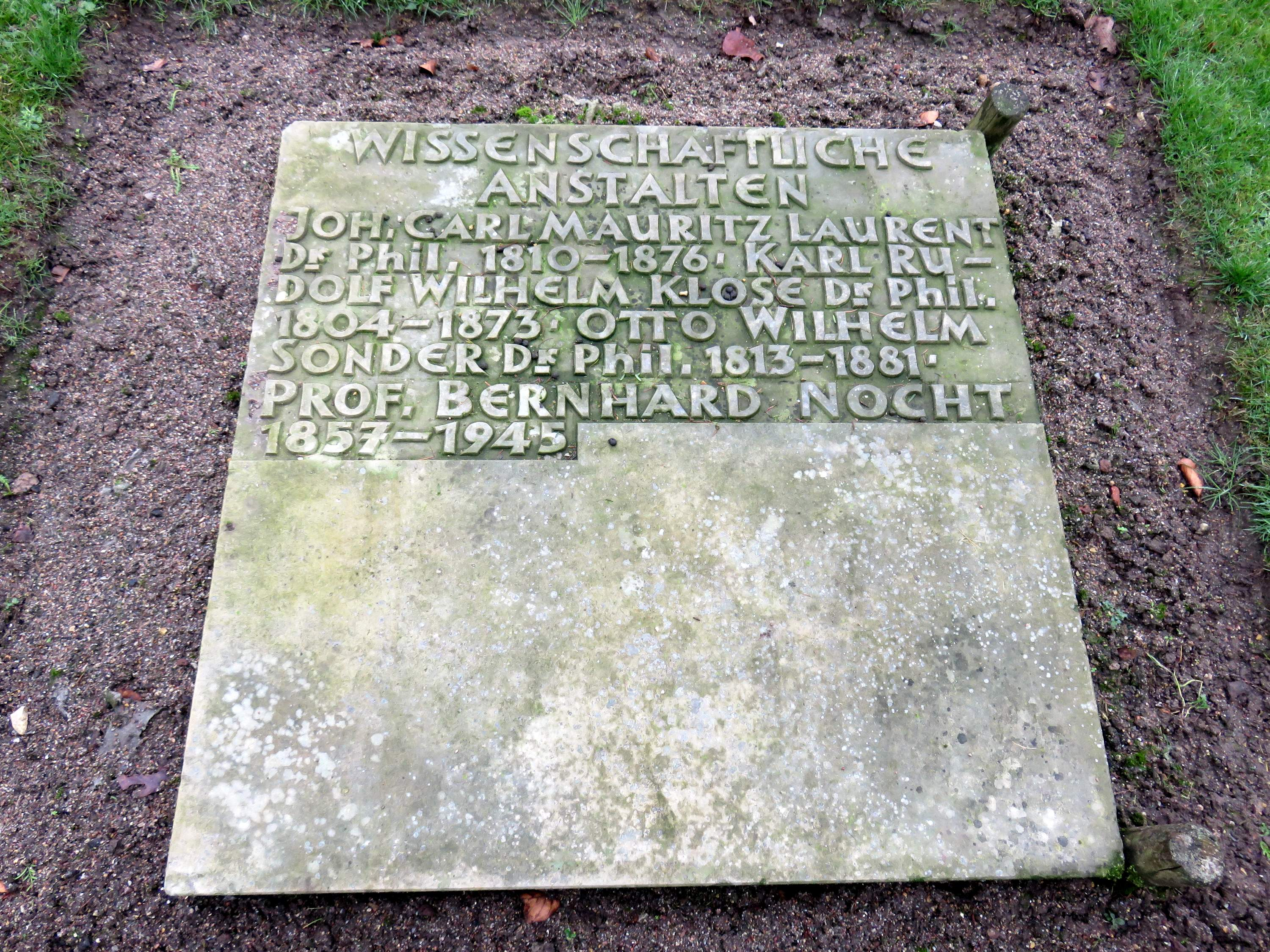 Sammelgrabmal Wissenschaftliche Anstalten im Bereich des Althamburgischen Gedächtnisfriedhofs auf dem Hamburger Friedhof Ohlsdorf, südöstliche Querachse, zu Ehren von unter anderen Karl Rudolf Wilhelm Klose, Otto Wilhelm Sonder, Prof. Bernard Nocht.